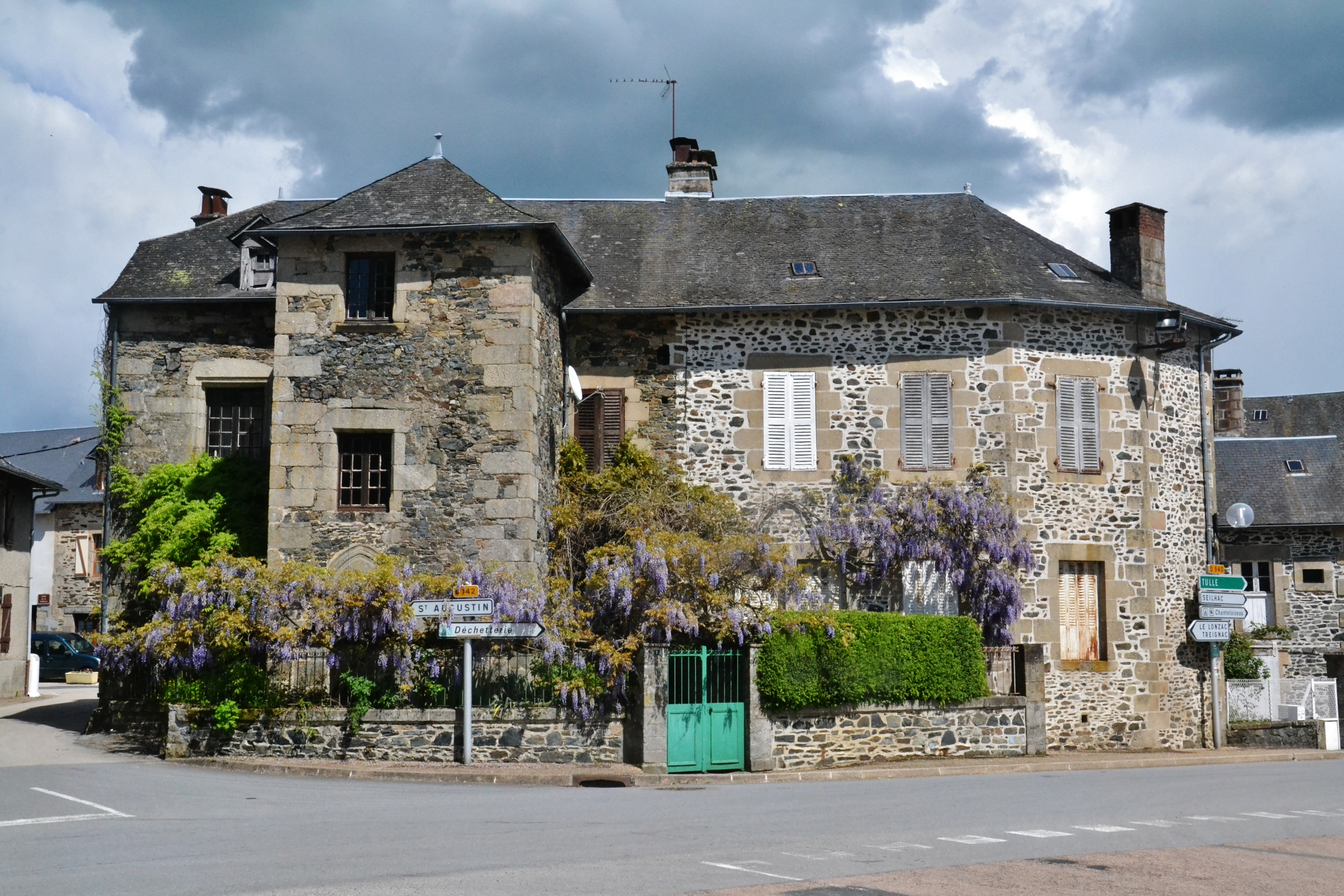 Une maison à Chamboulive (Corrèze, France)